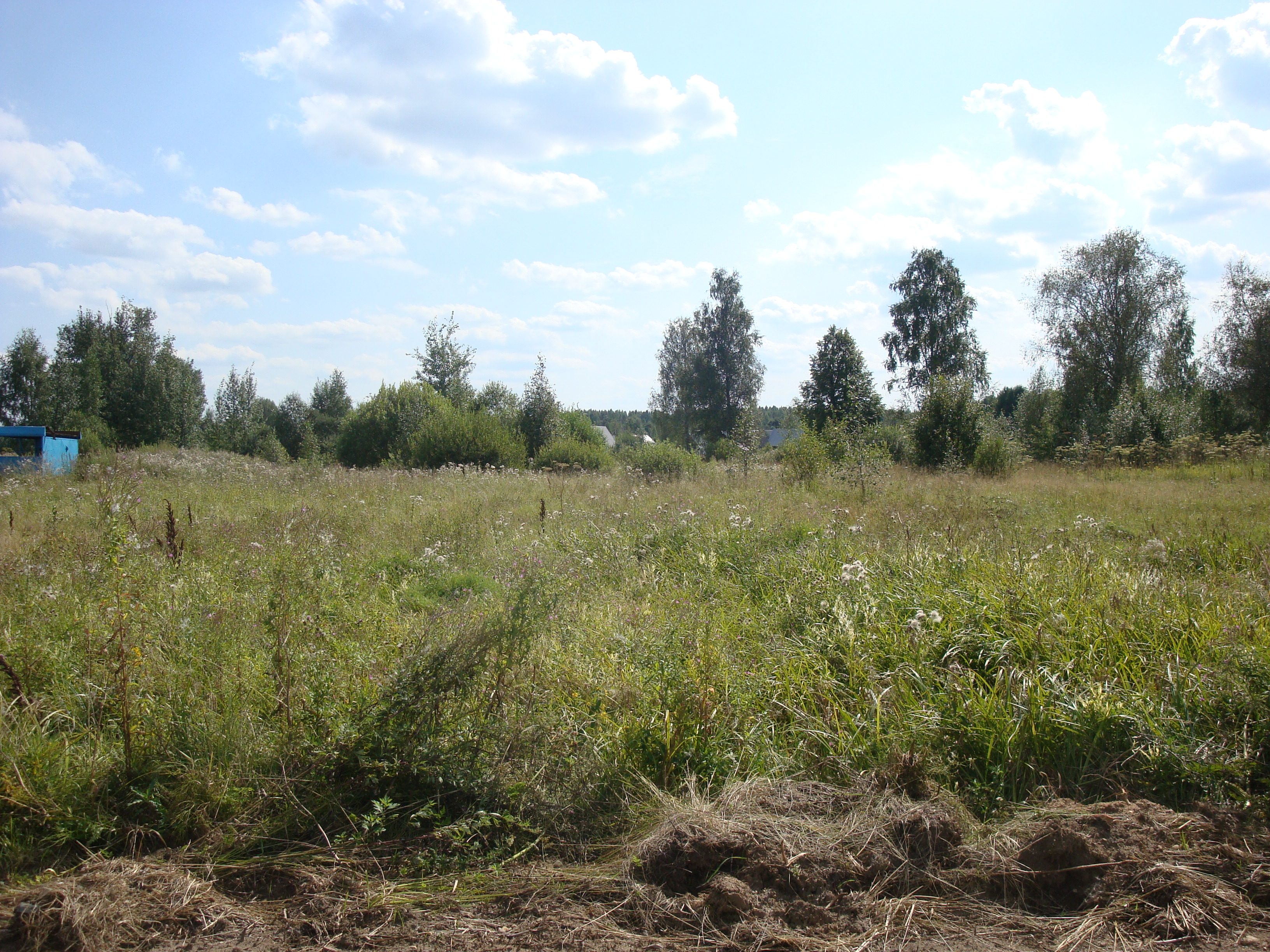 Бельское, вид на улицу Центральную